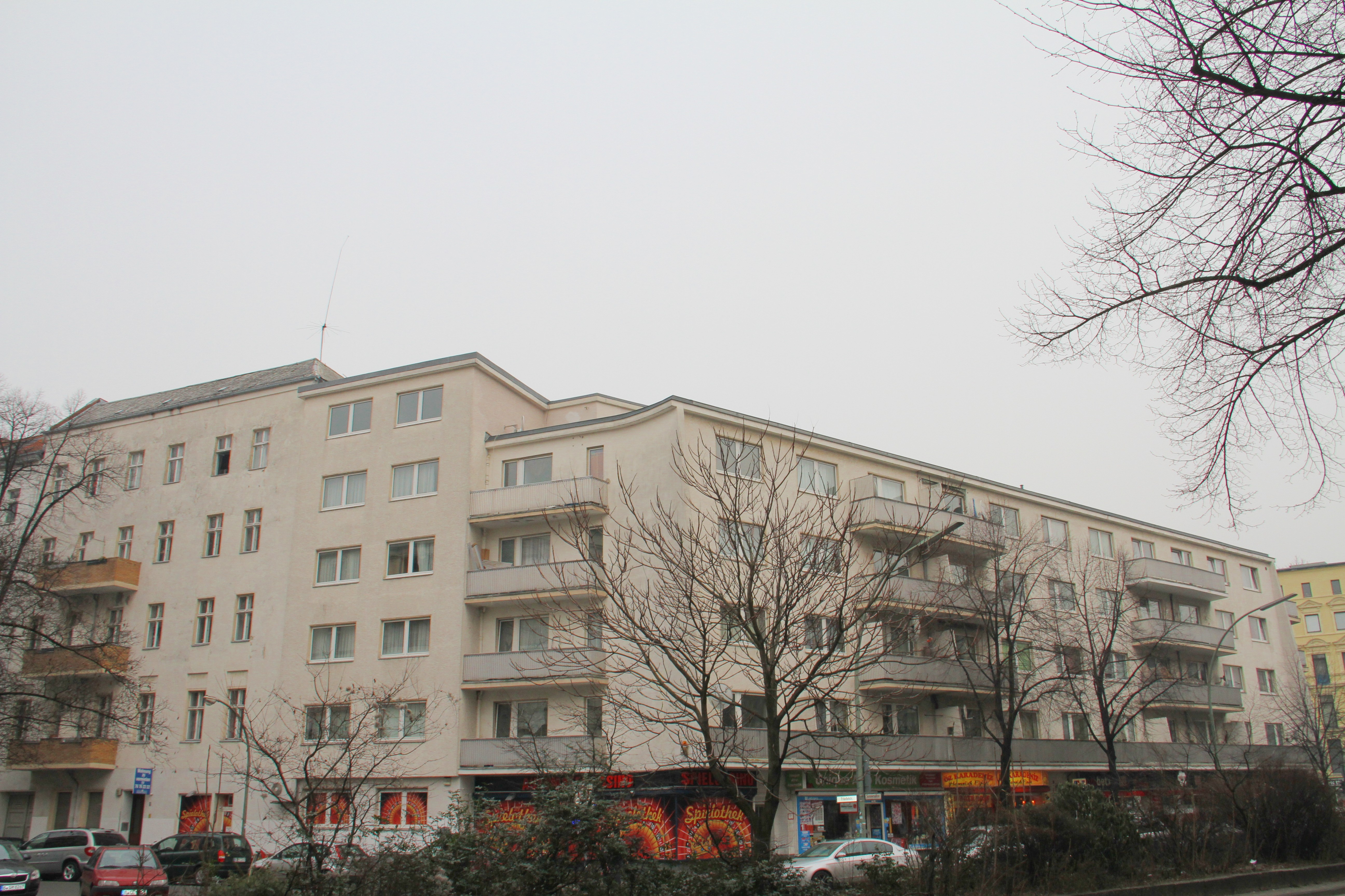 Mietshaus, 1953–1955 von Helmut Ollk